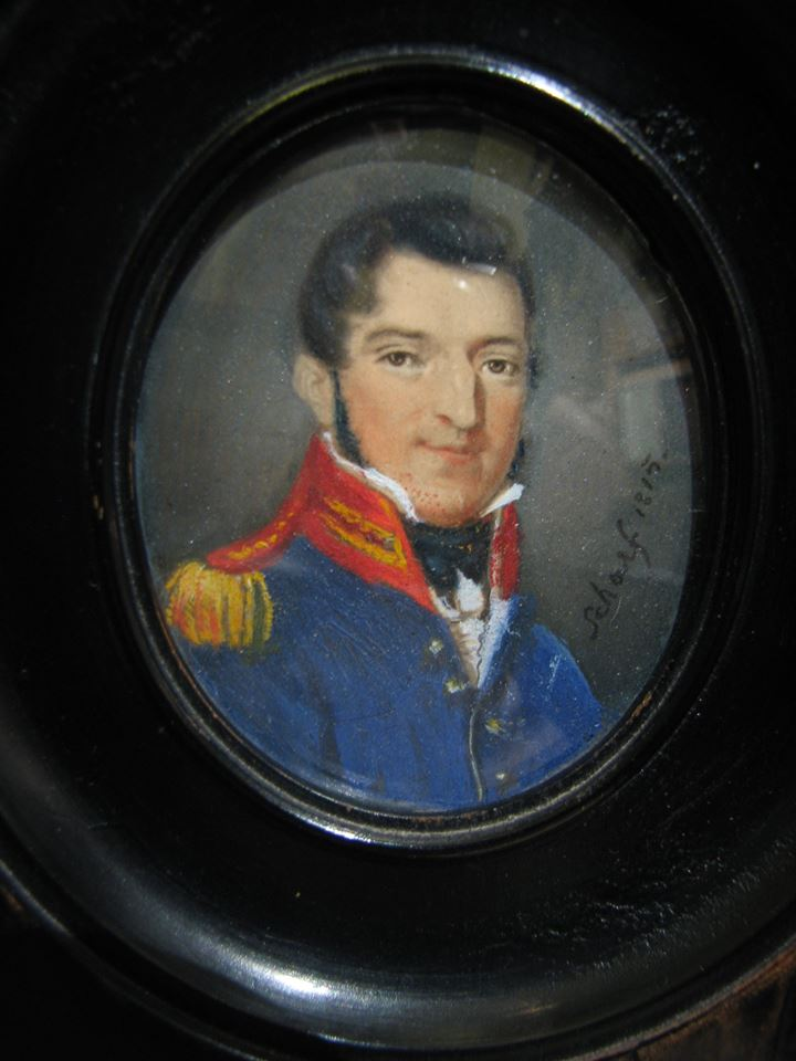 Portrait du colonel J. Gleeson, du clan O'Gleeson (Ireland), 1763-1815.